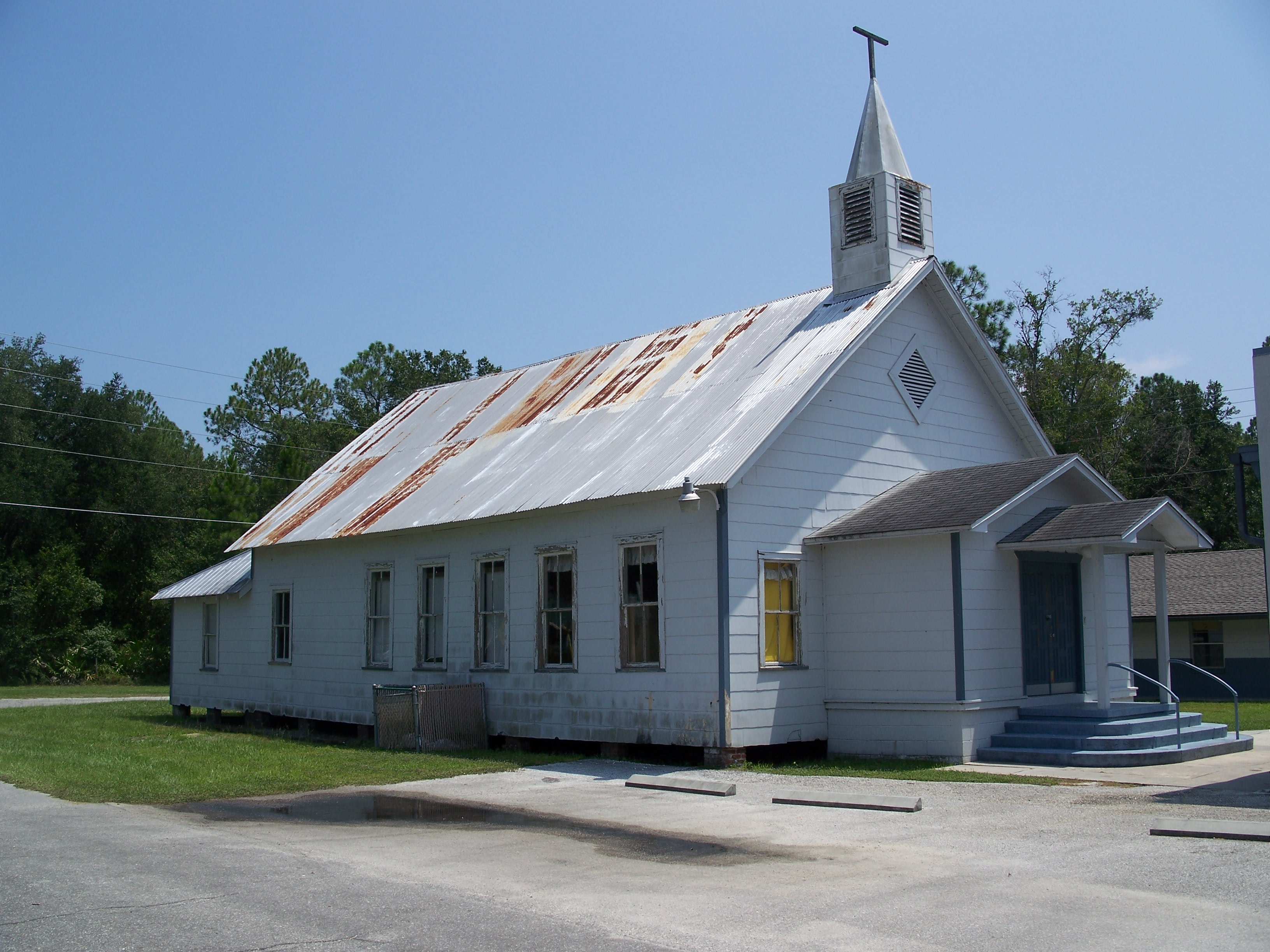 Bostwick Baptist Church, in Bostwick, Florida